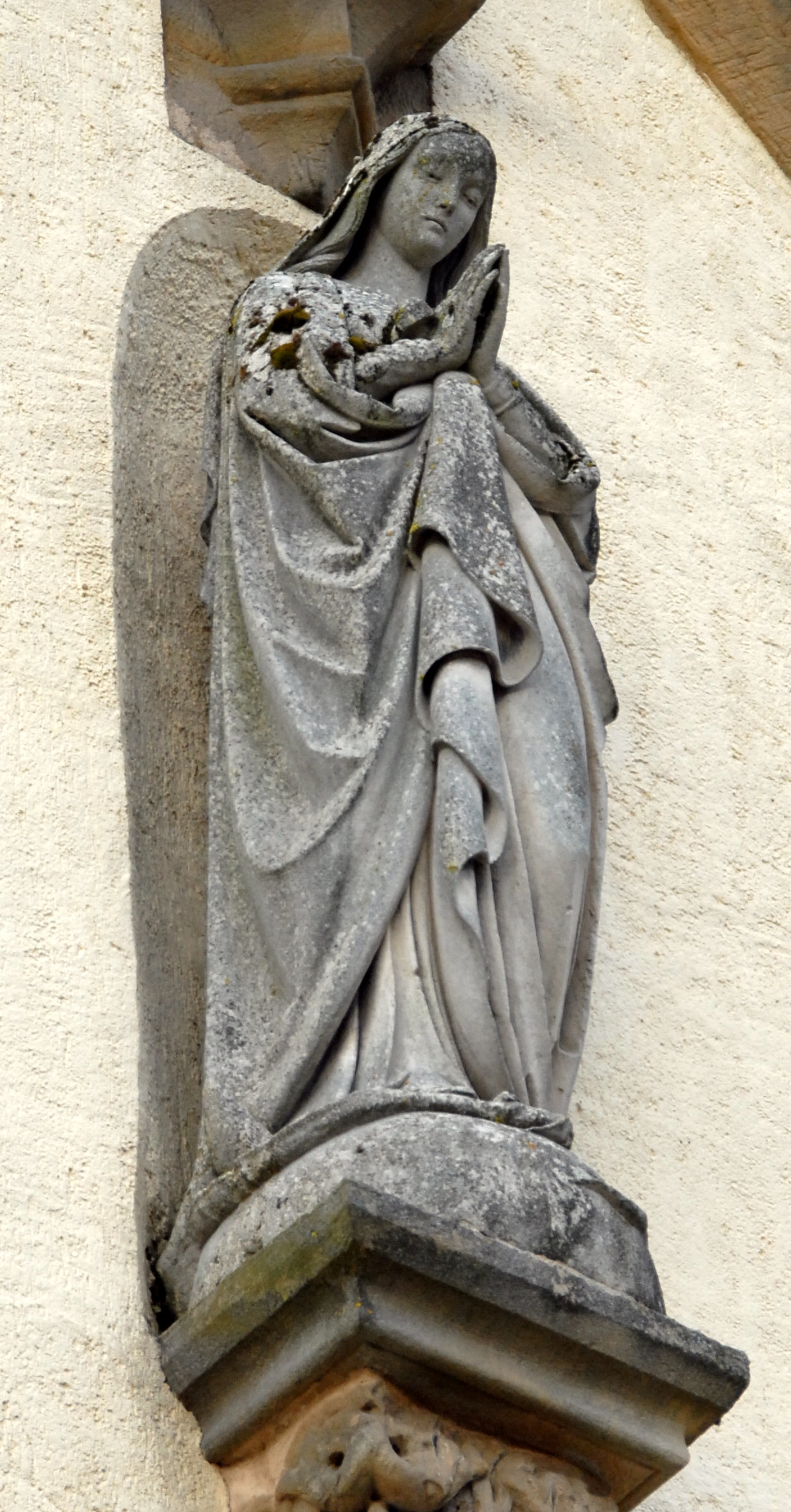 Sujet: Statue "Onbefleckten Empfängnes", e Wierk vum Michel Deutsch (1837-1905) un der Fassad iwwer dem Portal vun der Kierch zu Buerglënster Auteur: Fliedermaus Source: Eege Photo vum 1. Juni 2008 Lizenz: CC-by-sa/3.0/lu Buerglenster Kategorie:Gemeng Jonglënster